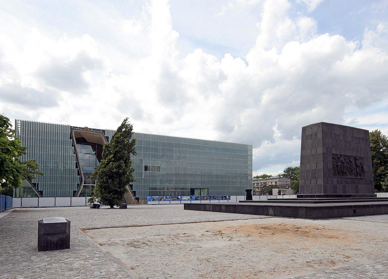 Muzeum od strony ulicy Zamenhofa, po prawej pomnik Bohaterów Getta